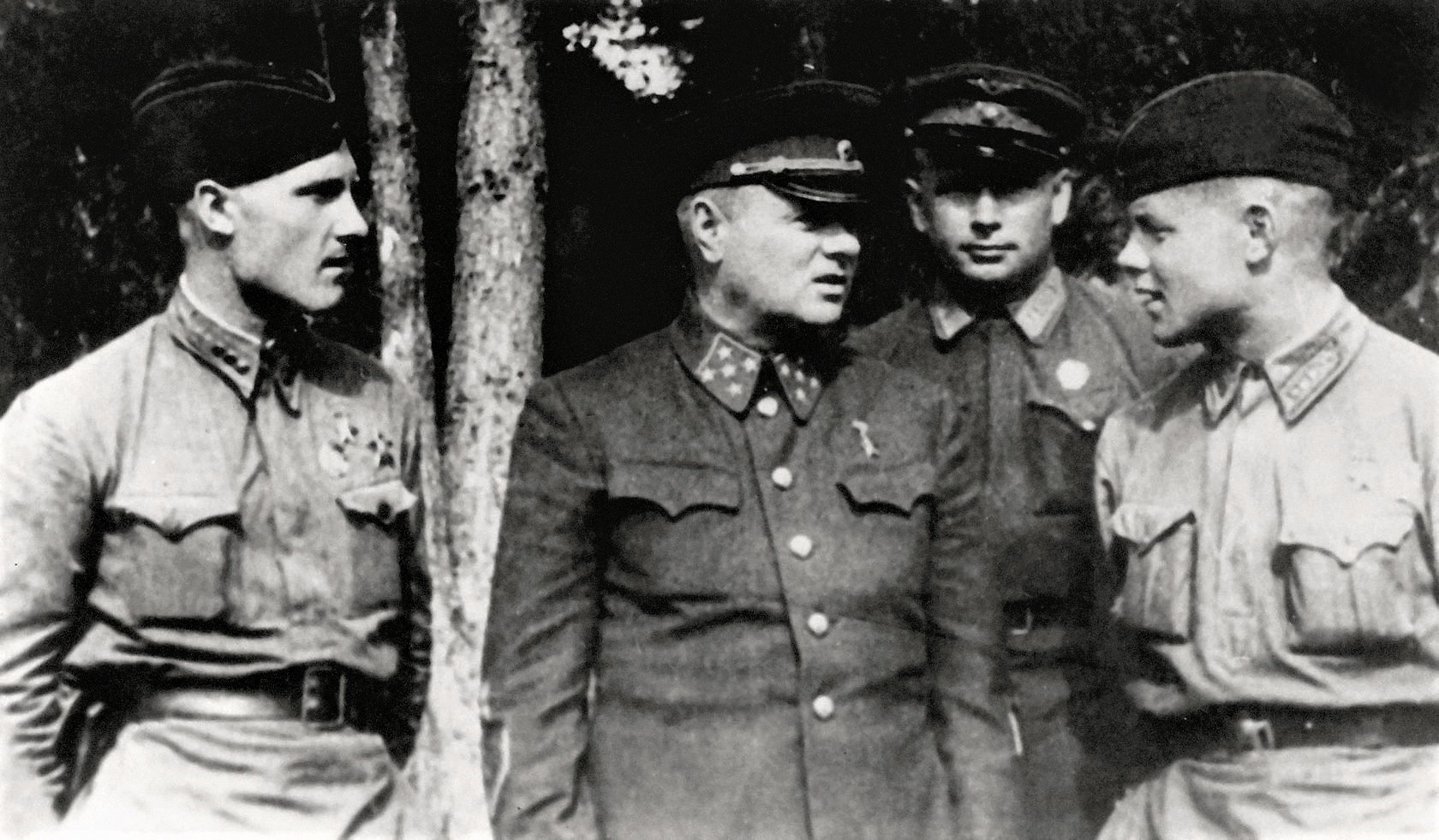 генерал армии К.А. Мерецков после посадки на аэродроме Хвойная беседует с лётчиками, прикрывавшими в воздухе его самолёт Douglas DC-3. Справа от Мерецкова Герой Советского Союза старший лейтенант А.П. Силантьев, будущий маршал авиации. Во время полёта Силантьев сбил немецкий Ме-109, атаковавший самолёт командующего Волховским фронтом